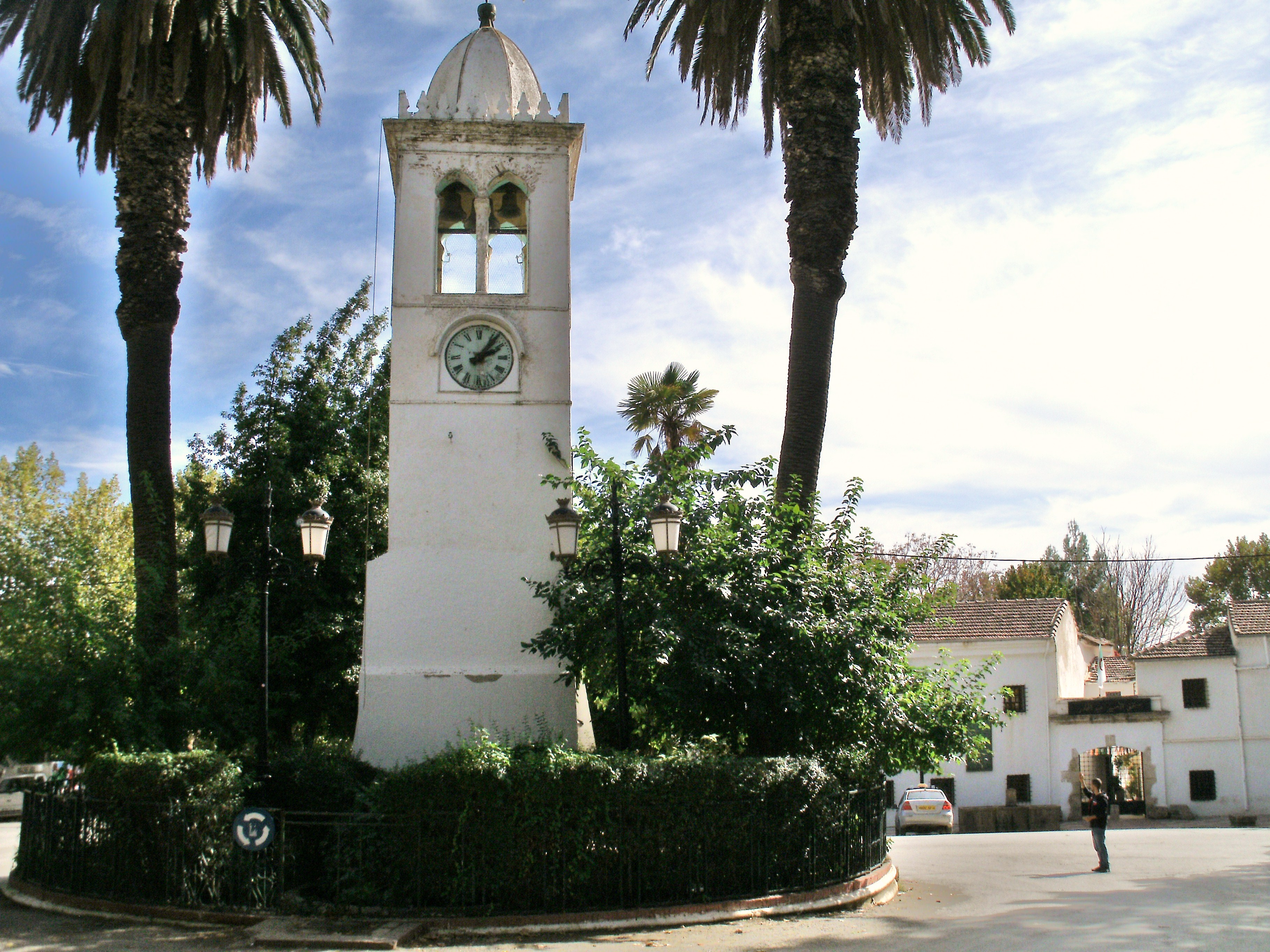 L'hypercentre. Le minaret de l'horloge et le musée.